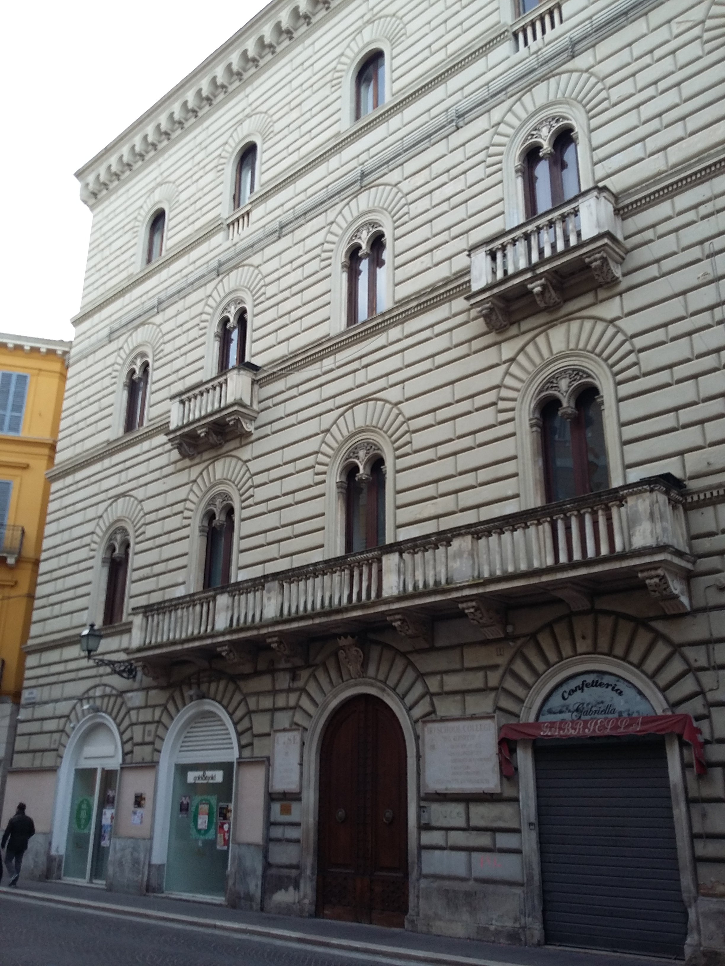 Il Palazzo Henrici fu la dimora dell'omonima e nobile famiglia.